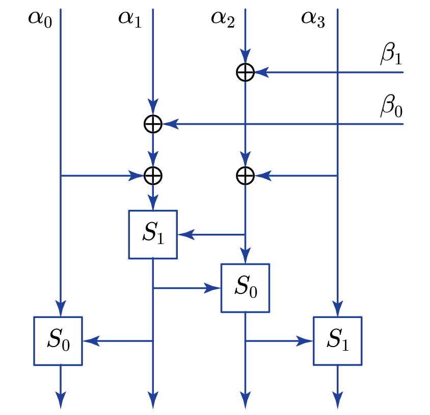 הפונקציה הפנימית f